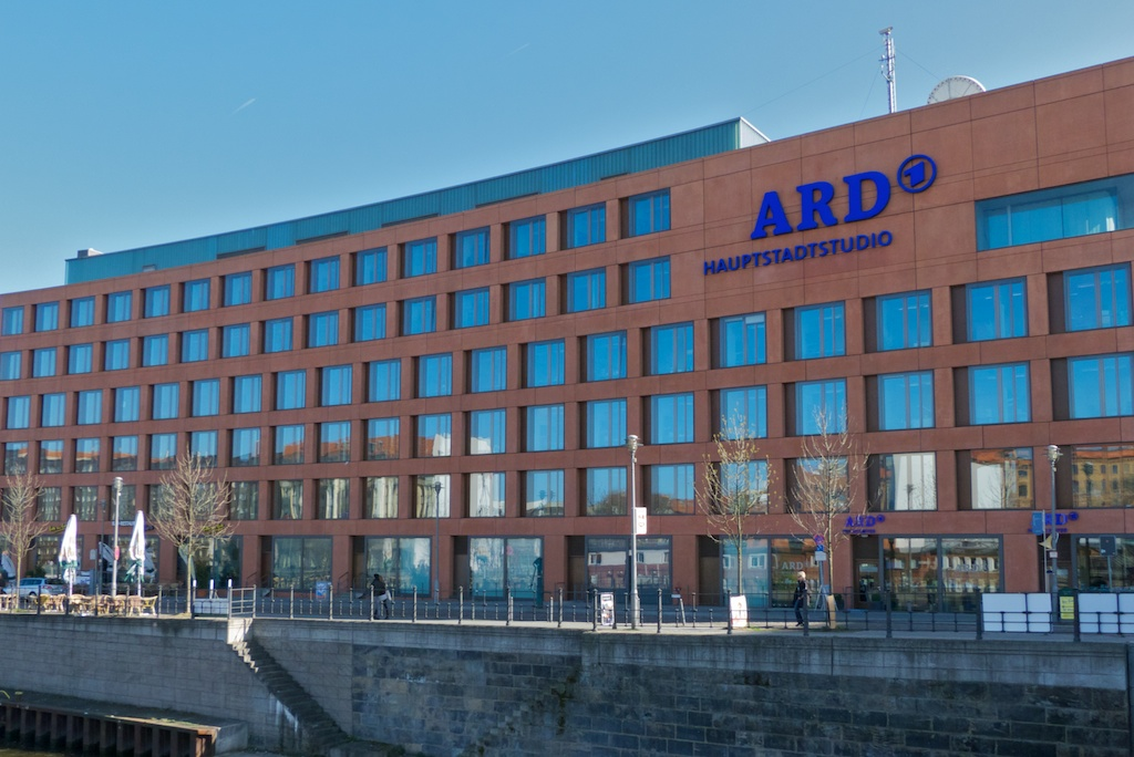 ARD-Hauptstadt-Studio